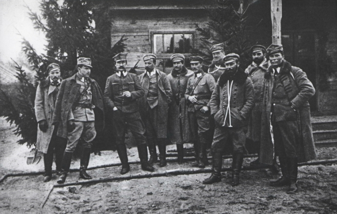 Rada Pułkowników Legionów Polskich w czasie spotkania w Legionowie na Wołyniu. Od lewej: kpt Marian Dąbrowski, ppłk Marian Januszajtis-Żegota, ppłk Henryk Minkiewicz, mjr Leon Berbecki, Władysław Belina-Prażmowski, płk Mieczysław Norwid-Neugebauer, rtm. Juliusz Ostoja-Zagórski, ppłk Edward Rydz-Śmigły, mjr Ottokar Brzoza-Brzezina, mjr Andrzej Galica.